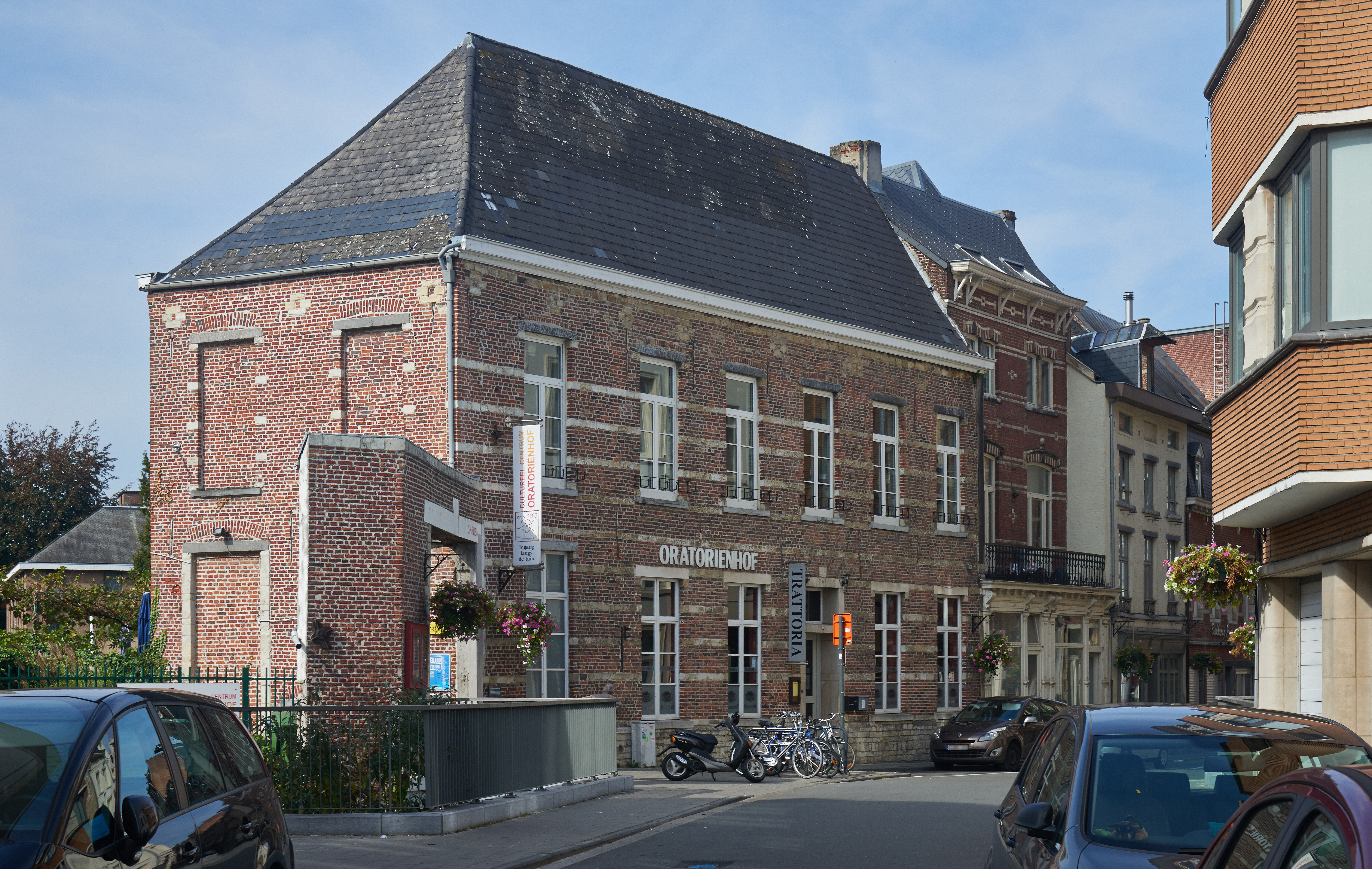 Leuven, Mechelsestraat 111, Oratoriënhof